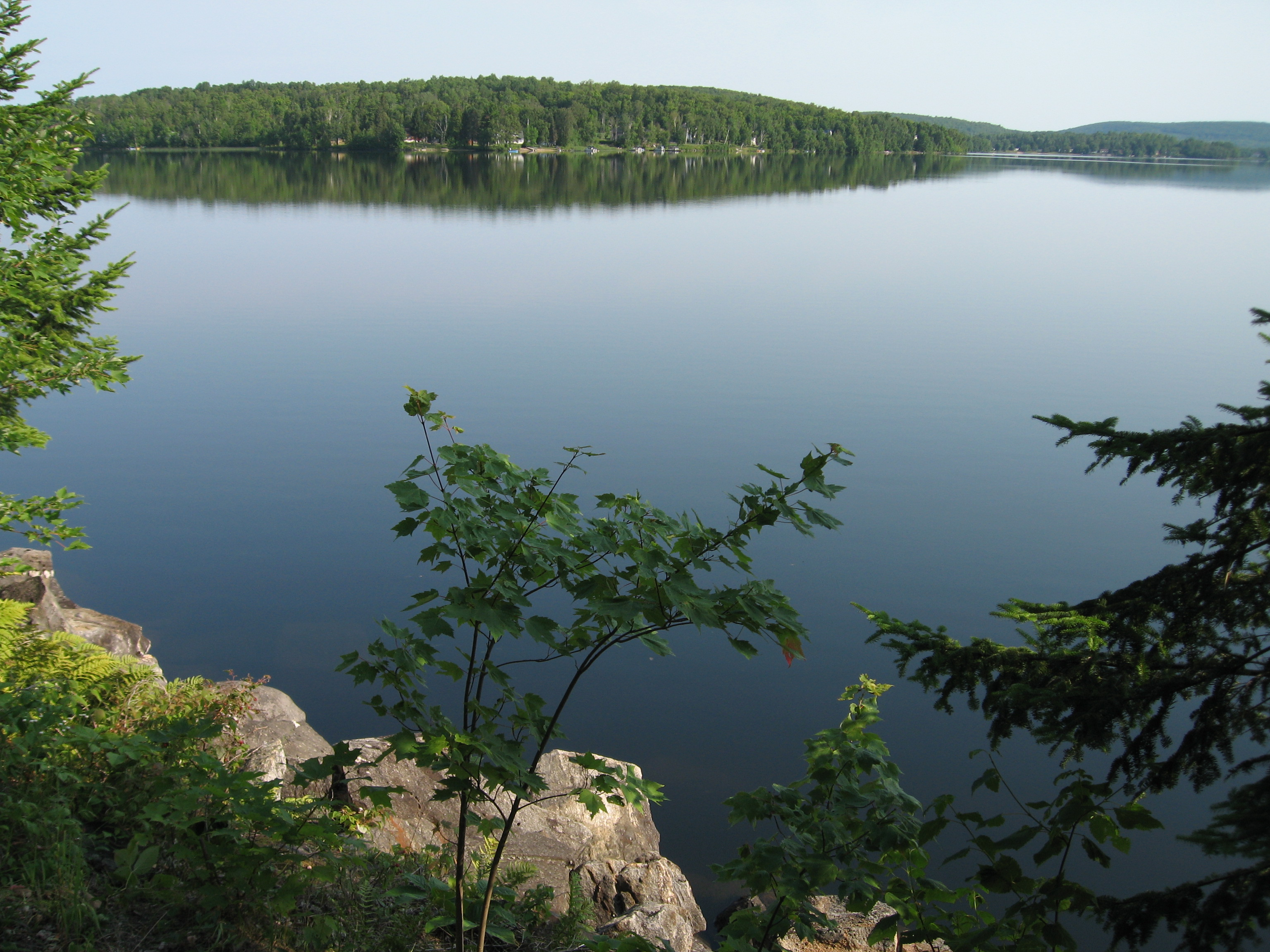 Photo du Lac-des-Écorces prise de la piste cyclable du p'tit train du nord.